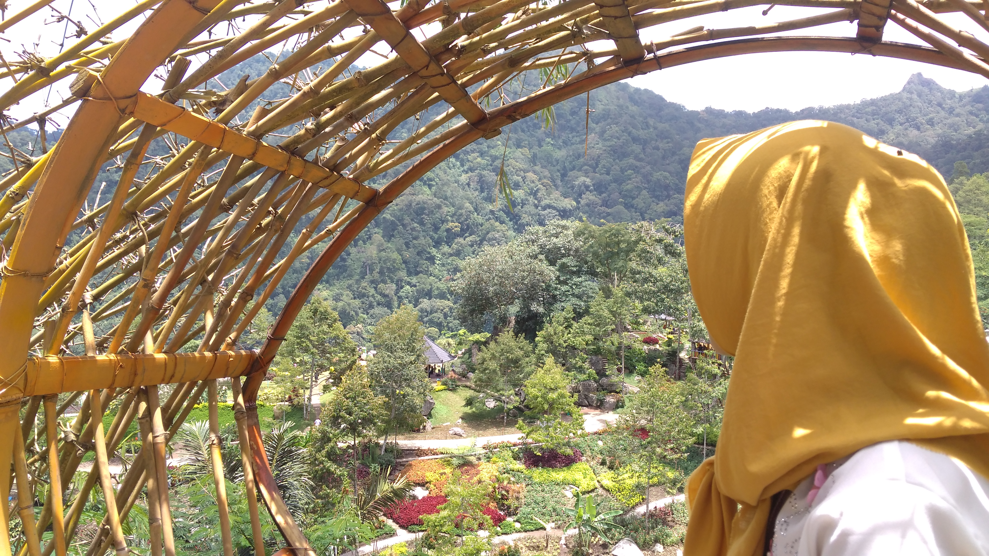 Jawa: gambar punika dipunpendhet ing papan panggenan wisata watu rumpuk desa mendak, Kabupaten Madiun, Jawa Timur